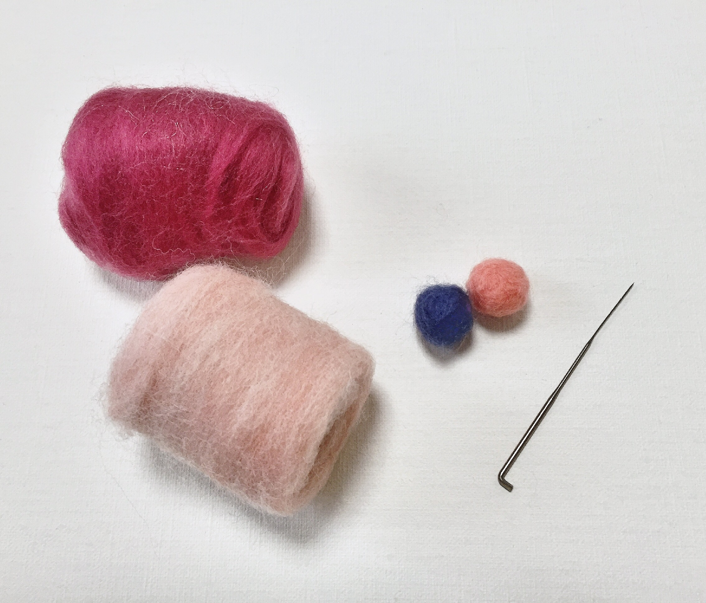 羊毛フェルト使用イメージ図